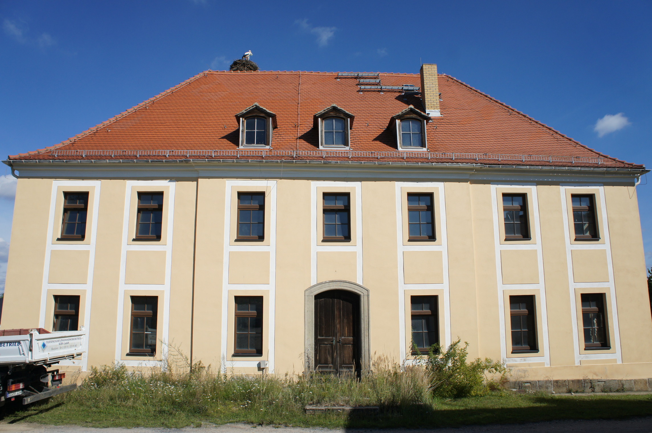 Rittergut Loga, Nr. 24/24 a, 02633 Neschwitz, OT Loga. Ein Herrensitz ist 1280 erwähnt, vermutlich handelt es sich um das 1550 erwähnte Rittergut. Bis 1622 im Besitz der Familie von Luttitz, verkauft u.a. an die von Zezschwitz, 1656 an Hans Caspar von Haugwitz. Nach der Enteignung der damaligen Besitzer 1945 wurden das Gebäude als Kinderkrippe und -garten genutzt. Das Herrenhaus ist saniert und momentan leerstehend. Südansicht Hornjoserbsce: Łahowski hród.